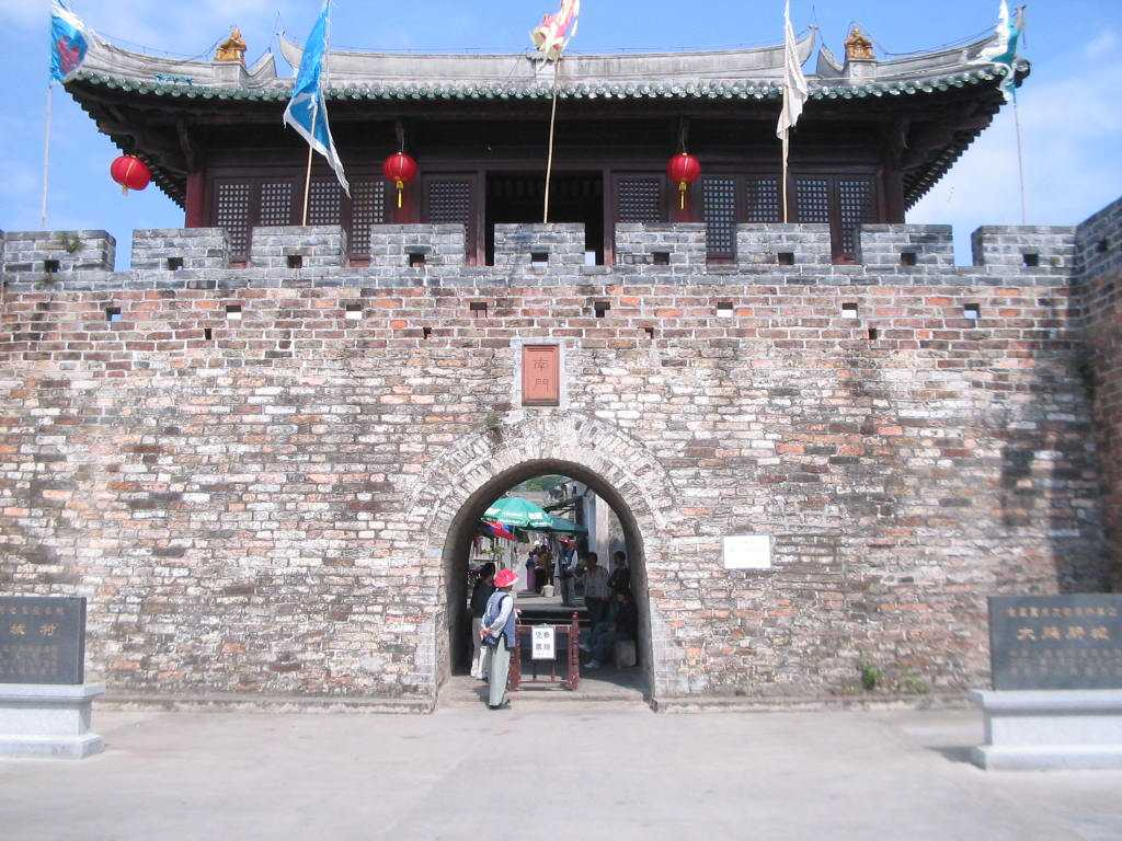 poort van dapengcheng